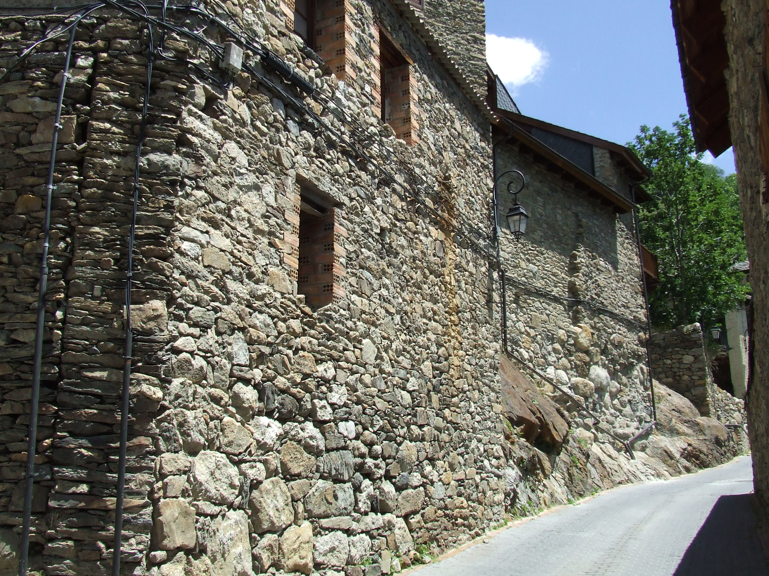 Cases de Durro (Vall de Boí, Alta Ribagorça)